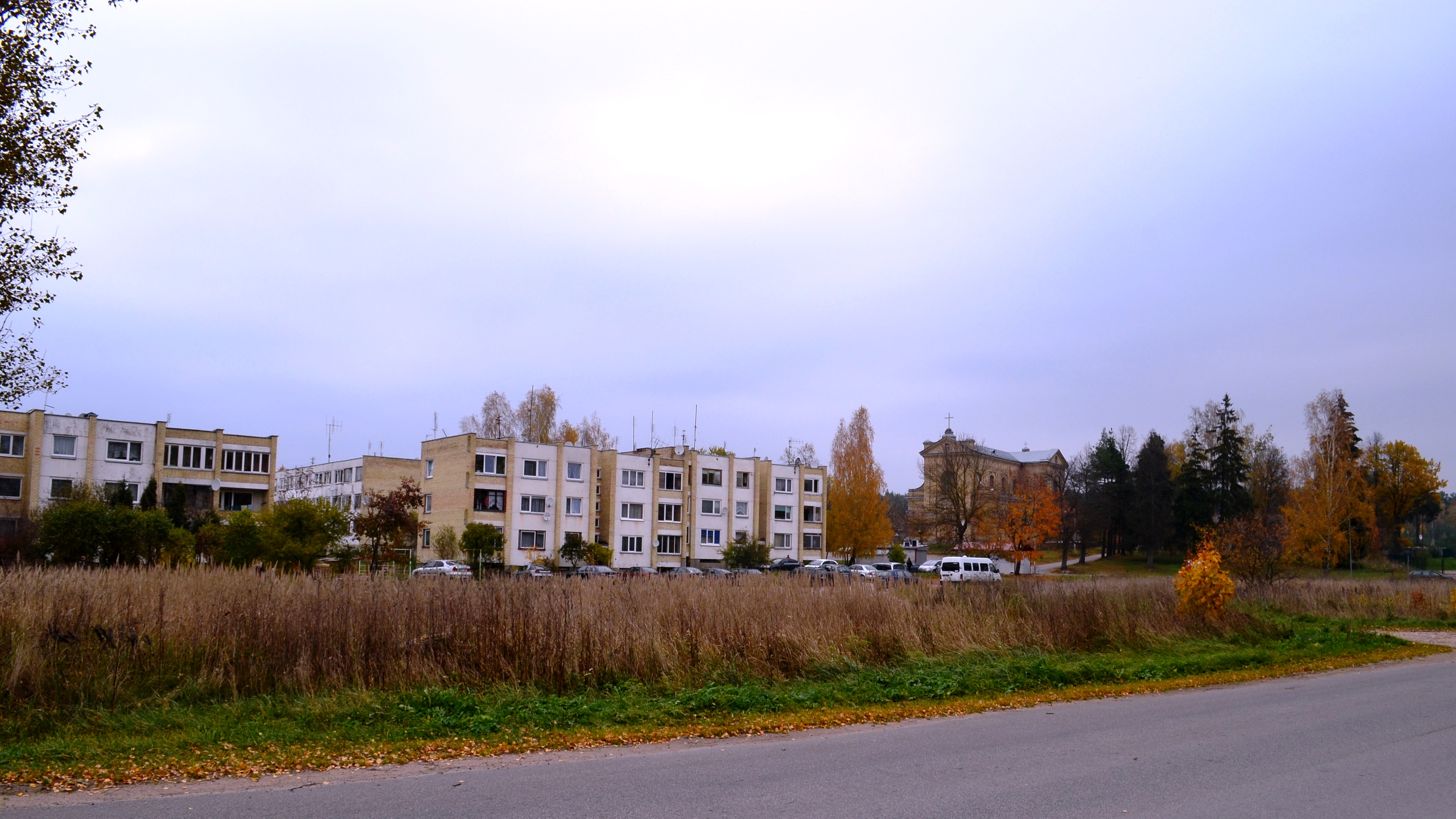 Vilniaus raj. priklausanti Vaidotų dalis